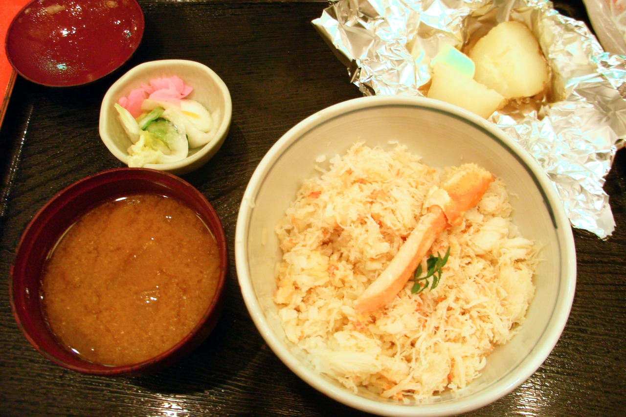 新千歳空港内の郷土料理屋で食べたかに飯丼。お安いのでそこそこ。右上のじゃがバターは昼に食べたエゾシカのジンギスカン定食に付いていたものよりはほくほくしておいしかった。